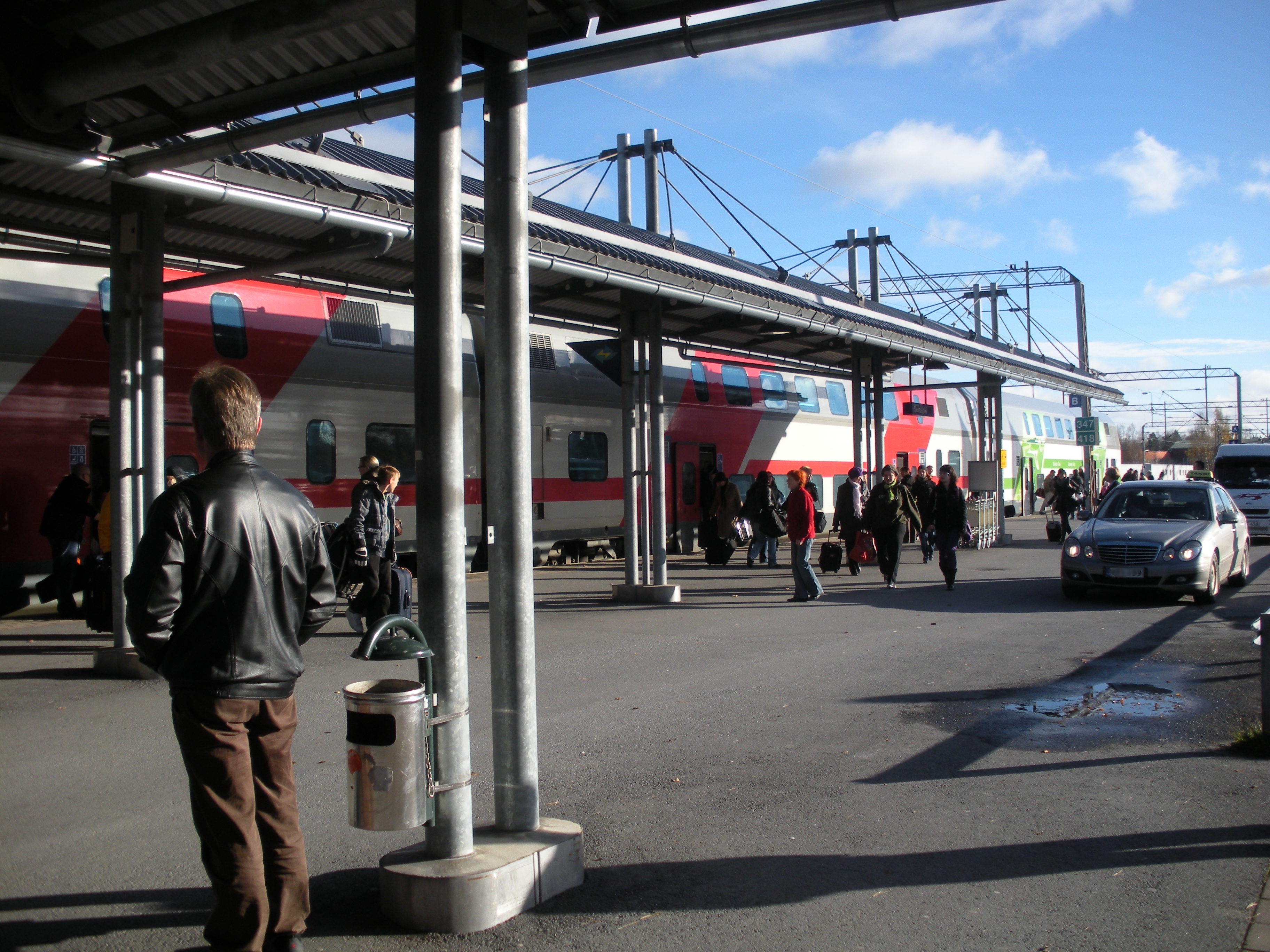 Intercity 47 Seinäjoen rautatieasemalla This photograph was taken with a Sony Alpha a5000.